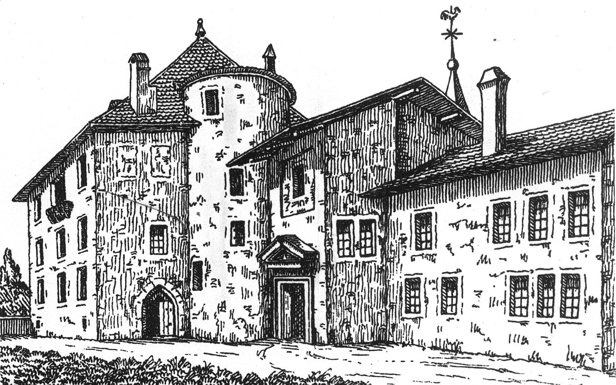 Komturei Compesières, Kanton Genf